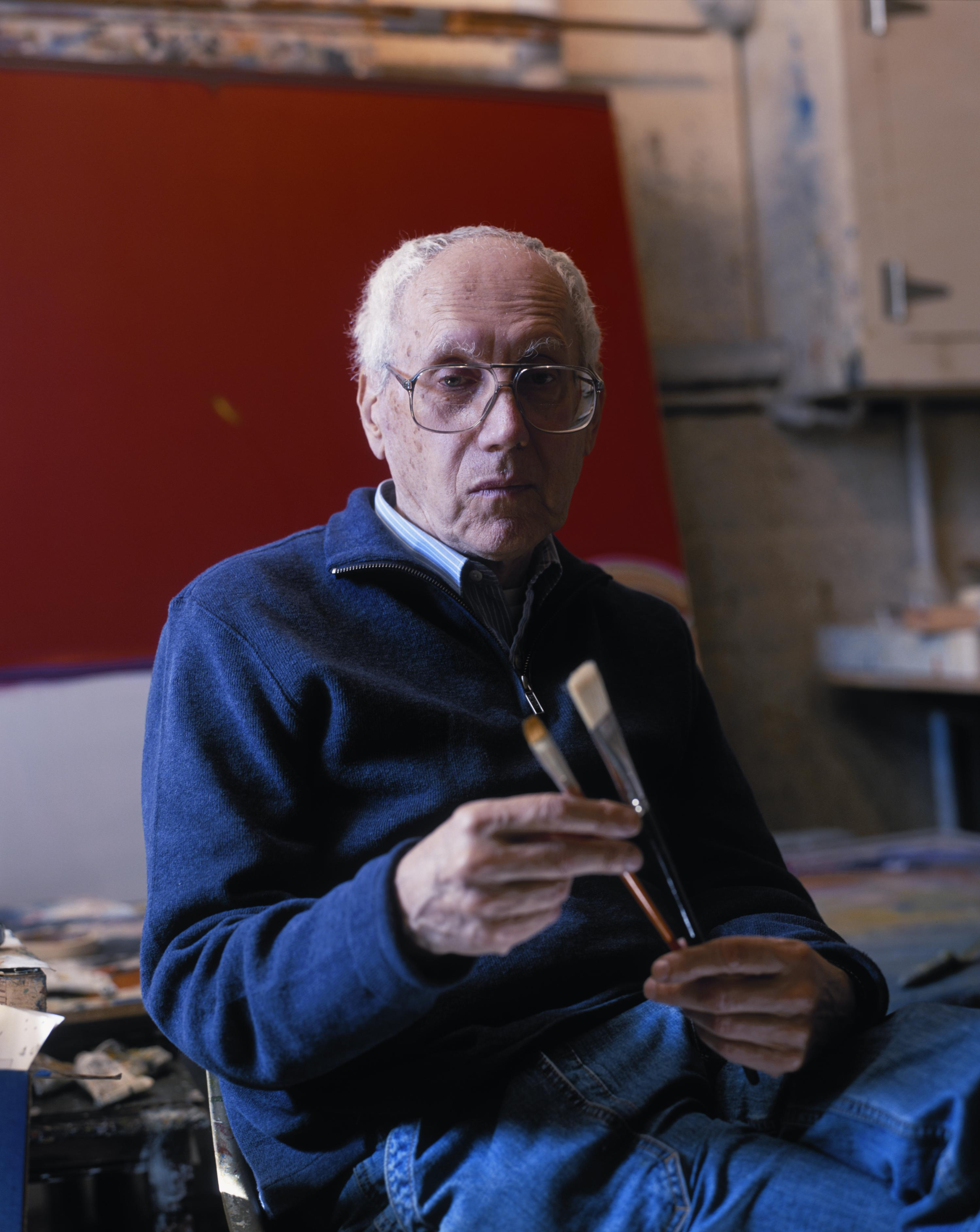 Raimonds Staprans